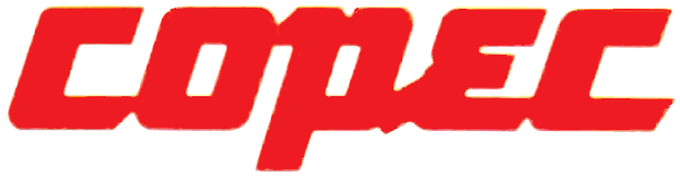 Logo de la Compañía de Petróleos de Chile desde 1961 hasta 1982